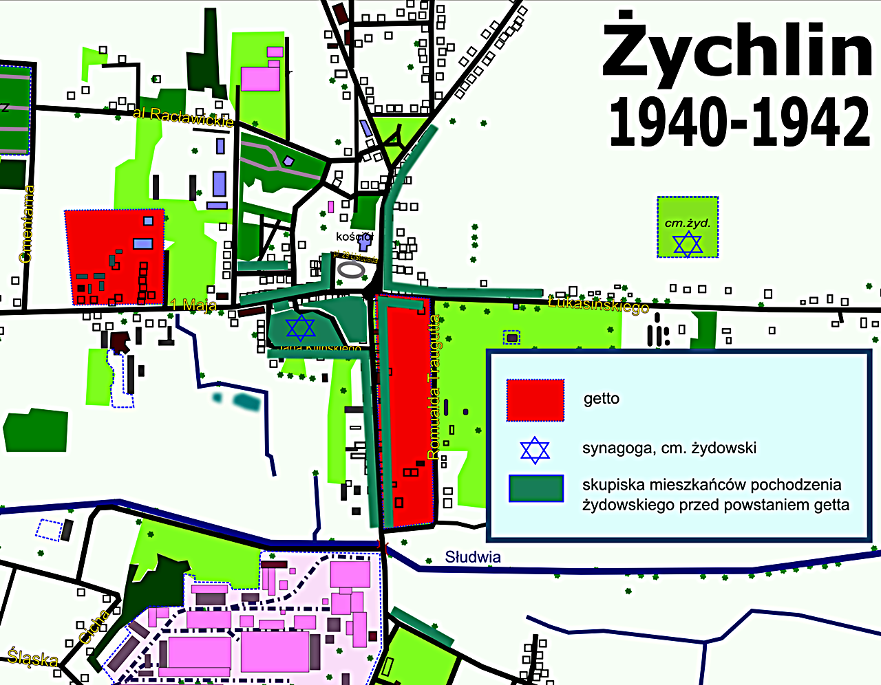 Żychlin, mapa getta i rozmieszczenia ludności żydowskiej